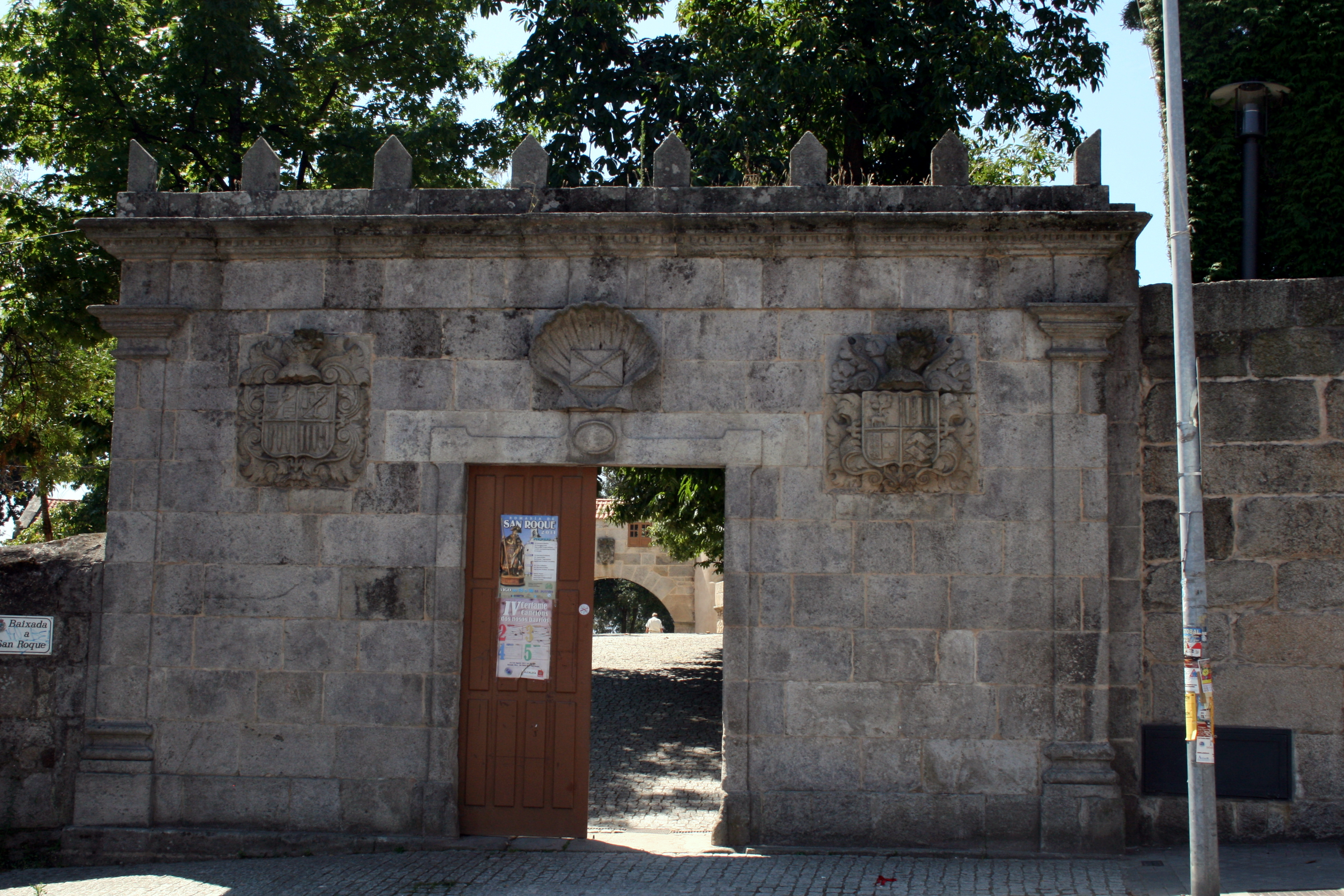 San Roque puerta de entrada